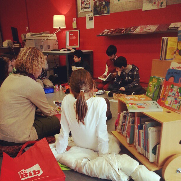 Boterhammen en gedichten. Njam Njam #gedichtendag #bibkortrijk #deBaai, Buurtbibliotheek Lange Munte Gedichtendag 31 januari 2013 met juf Maaike en de kinderen van de Freinetschool de Baai in de Buurtbibliotheek Lange Munte